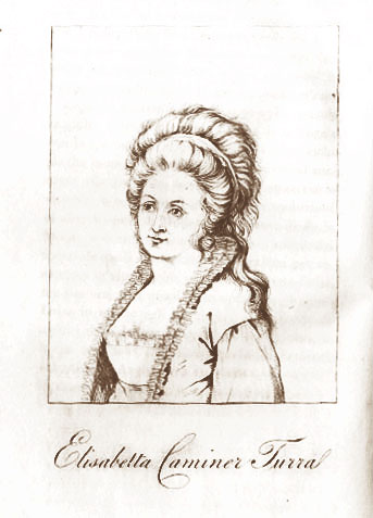 Ritratto di Elisabetta Caminer Turra (Venezia, 1751 - Orgiano, 1796) è stata una scrittrice ed editrice italiana.